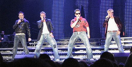 Les Westlife.